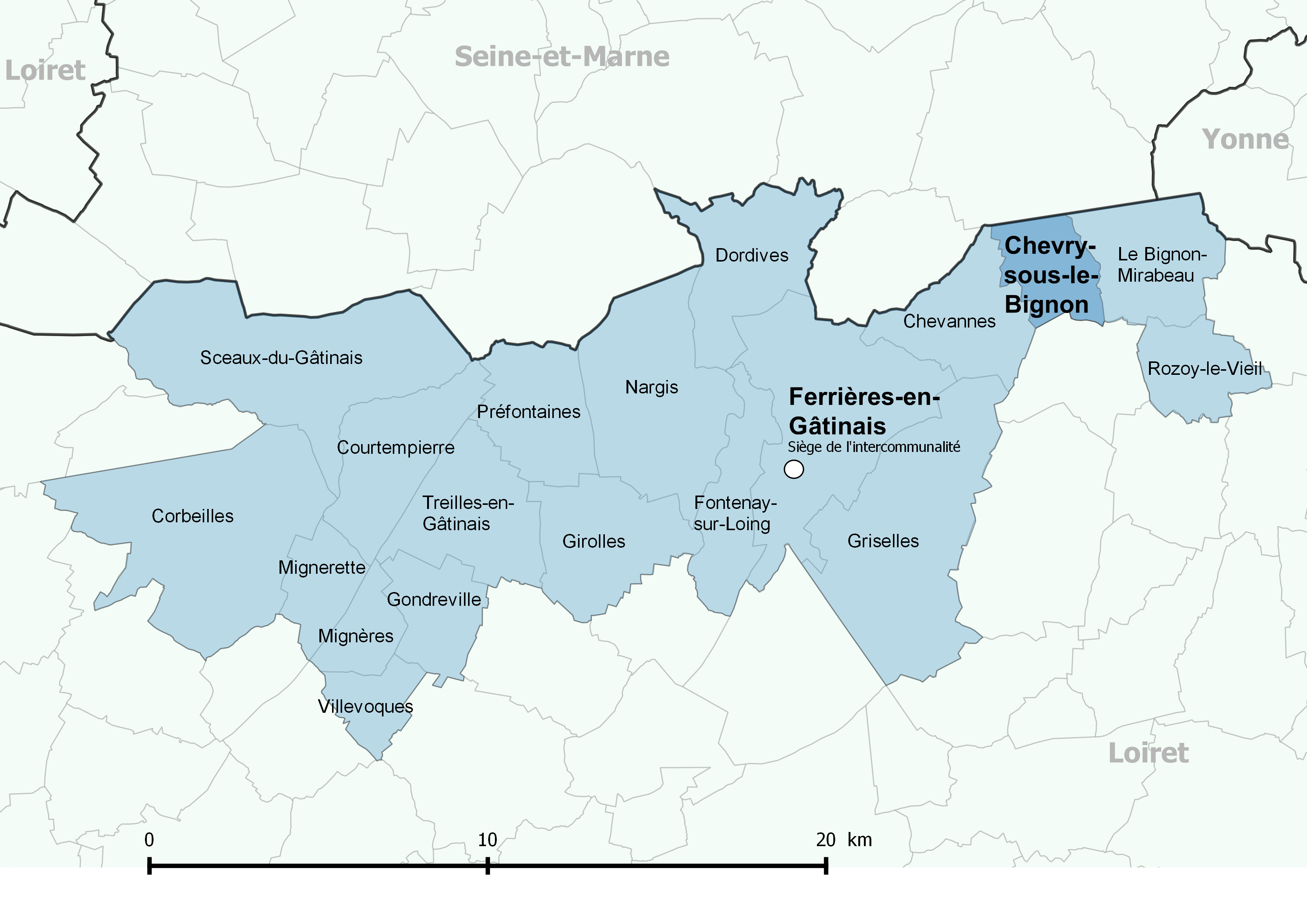 Périmètre de la communauté de communes des Quatre Vallées (Loiret) - Positionnement de la commune de Chevry-sous-le-Bignon.